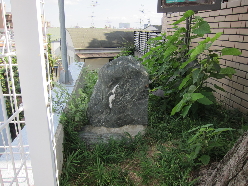 越水城の石碑（保護樹木クロマツ脇にある）